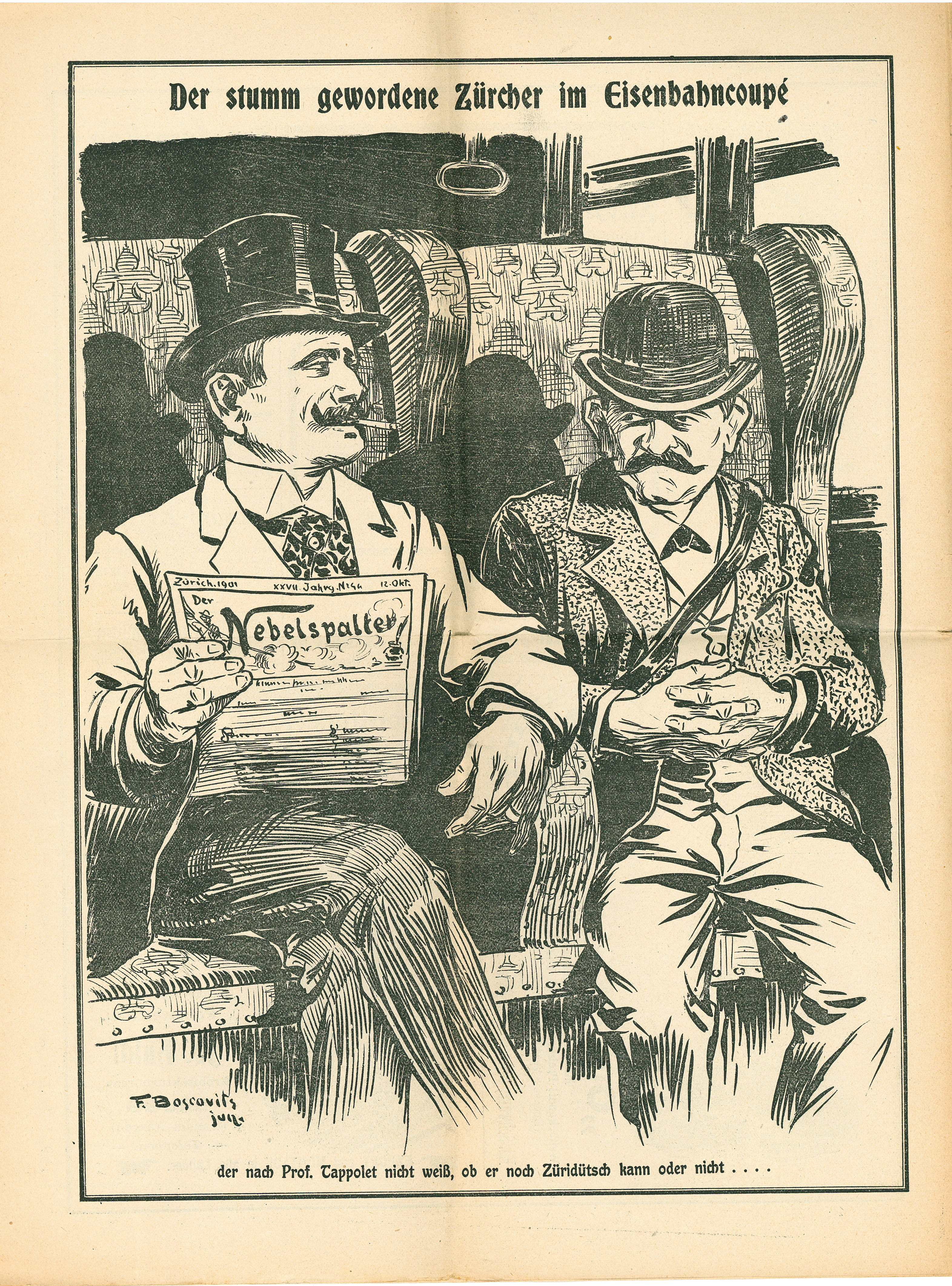 Karikatur aus dem Nebelspalter vom 12. Oktober 1901 betreffend Ernst Tappolets Pessimismus über die Zukunft des Schweizerdeutschen